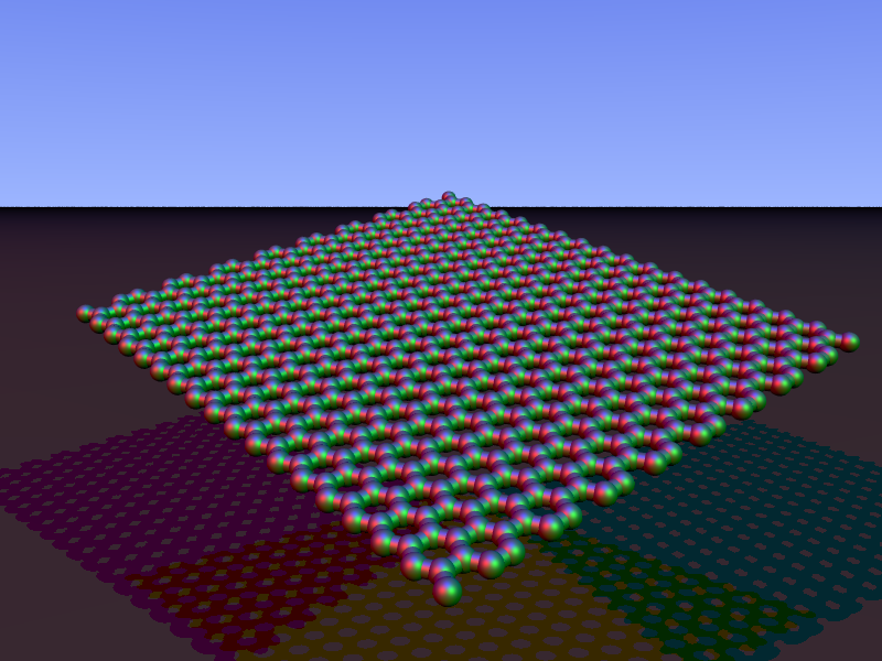 see name